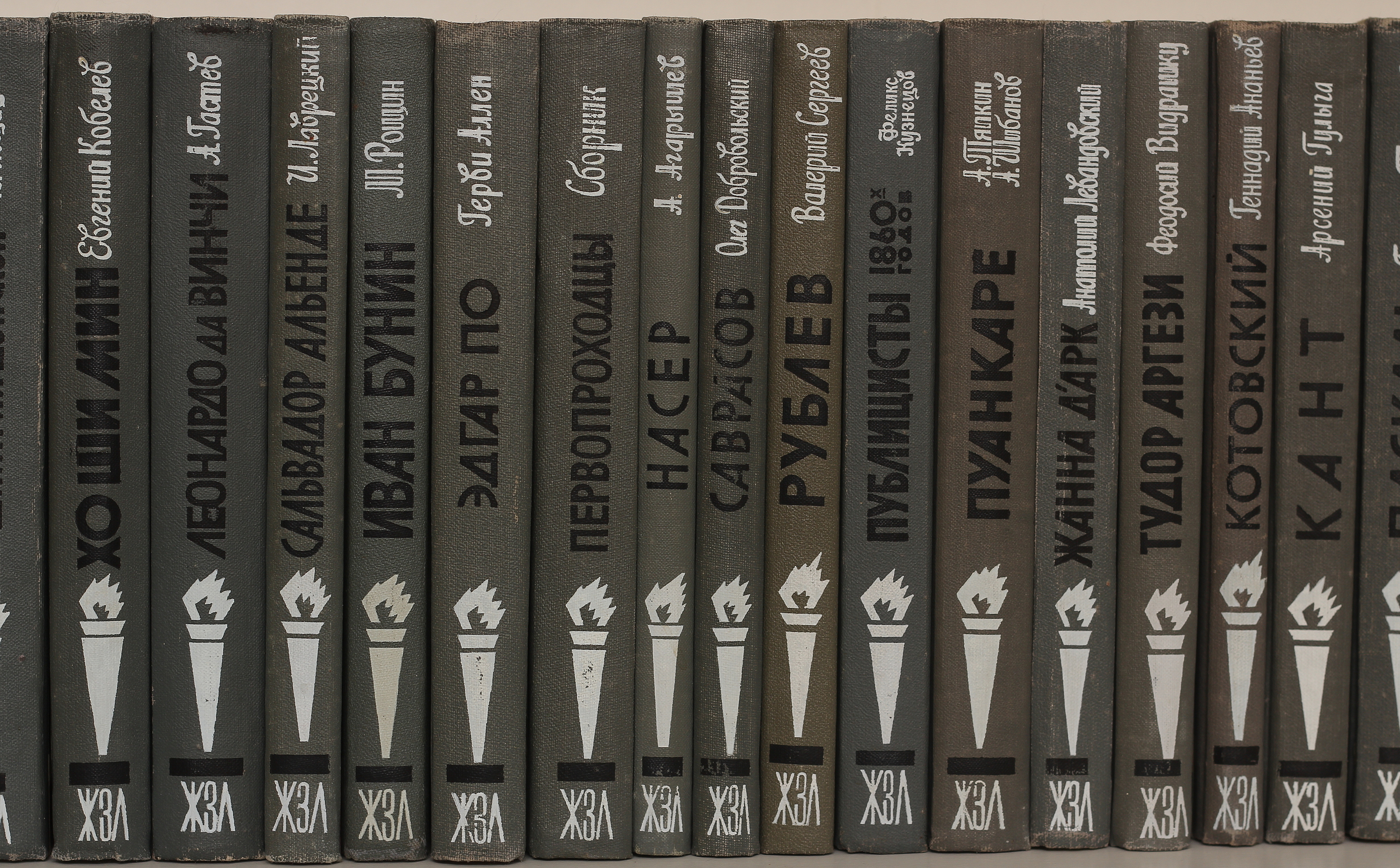 Жизнь замечательных людей на полке.